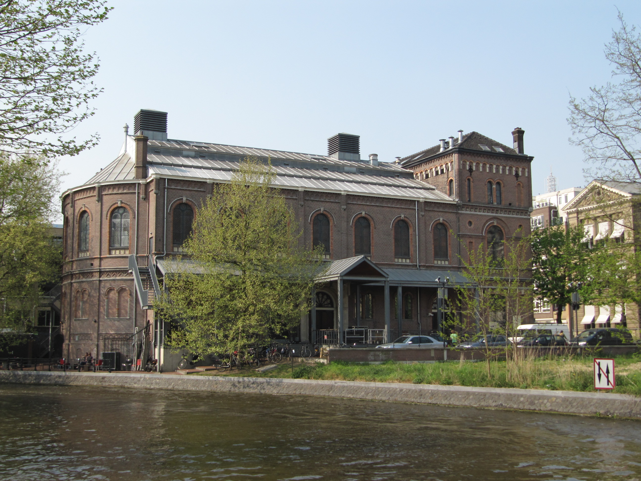 RM6400 Amsterdam - Weteringschans 6.jpg